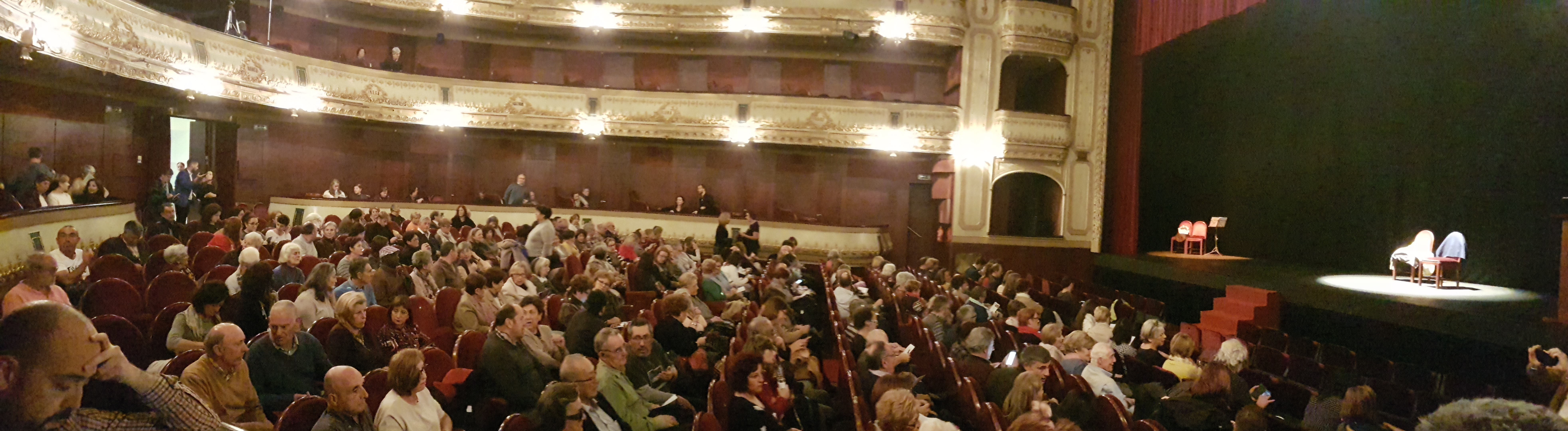 Acto no teatro Rosalía Castro da Coruña, con motivo do XXI Memorial de teatro Ibán Toxeiro e o XX aniversario do Grupo de Teatro da Agrupación Cultural Alexandre Bóveda.